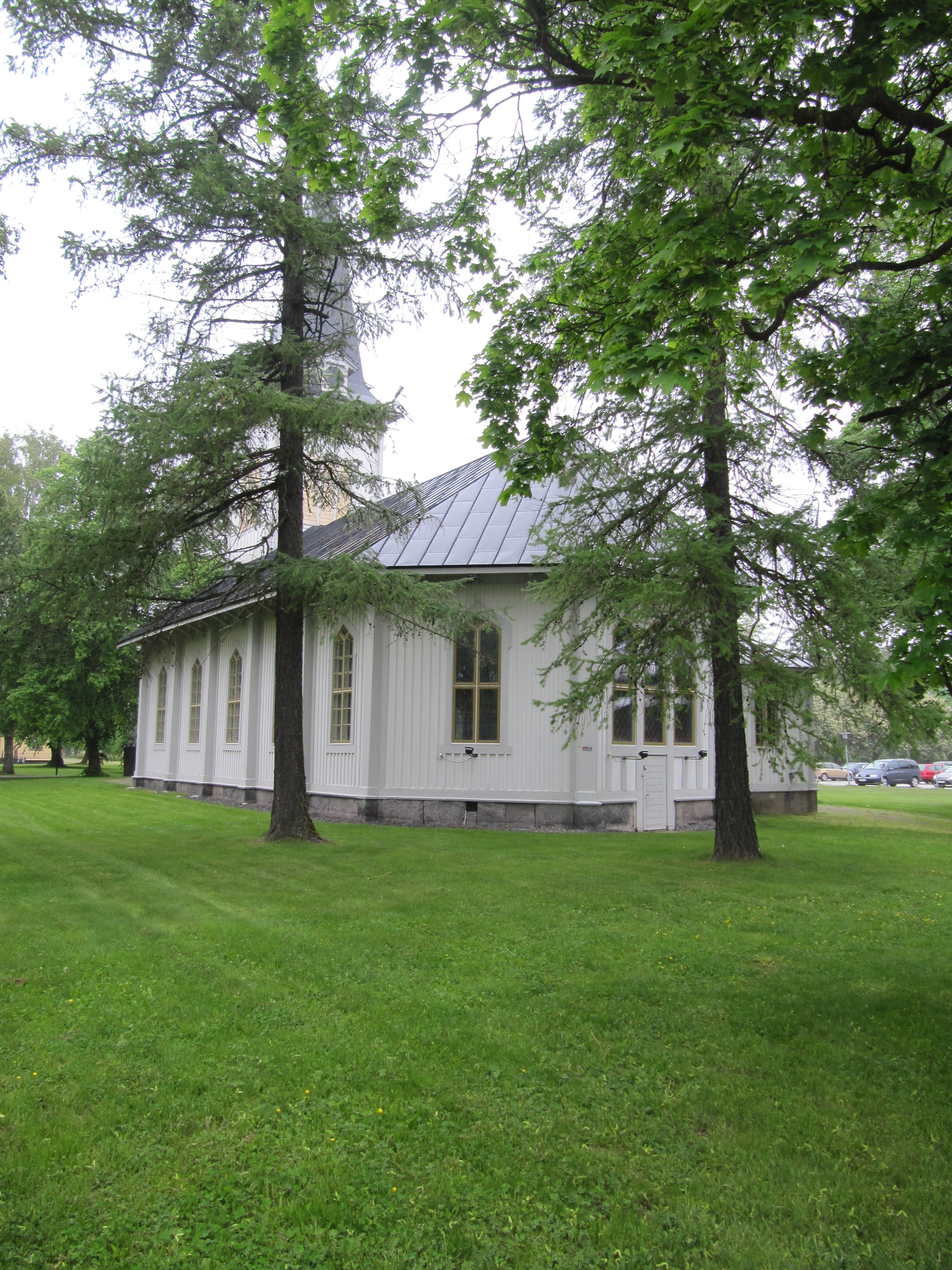 Sandarne kyrka